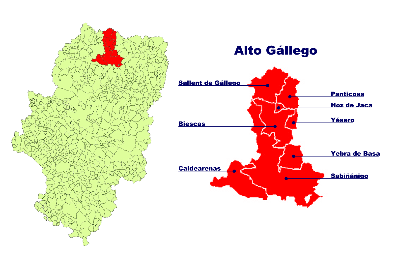 Comarca del Alto Gállego